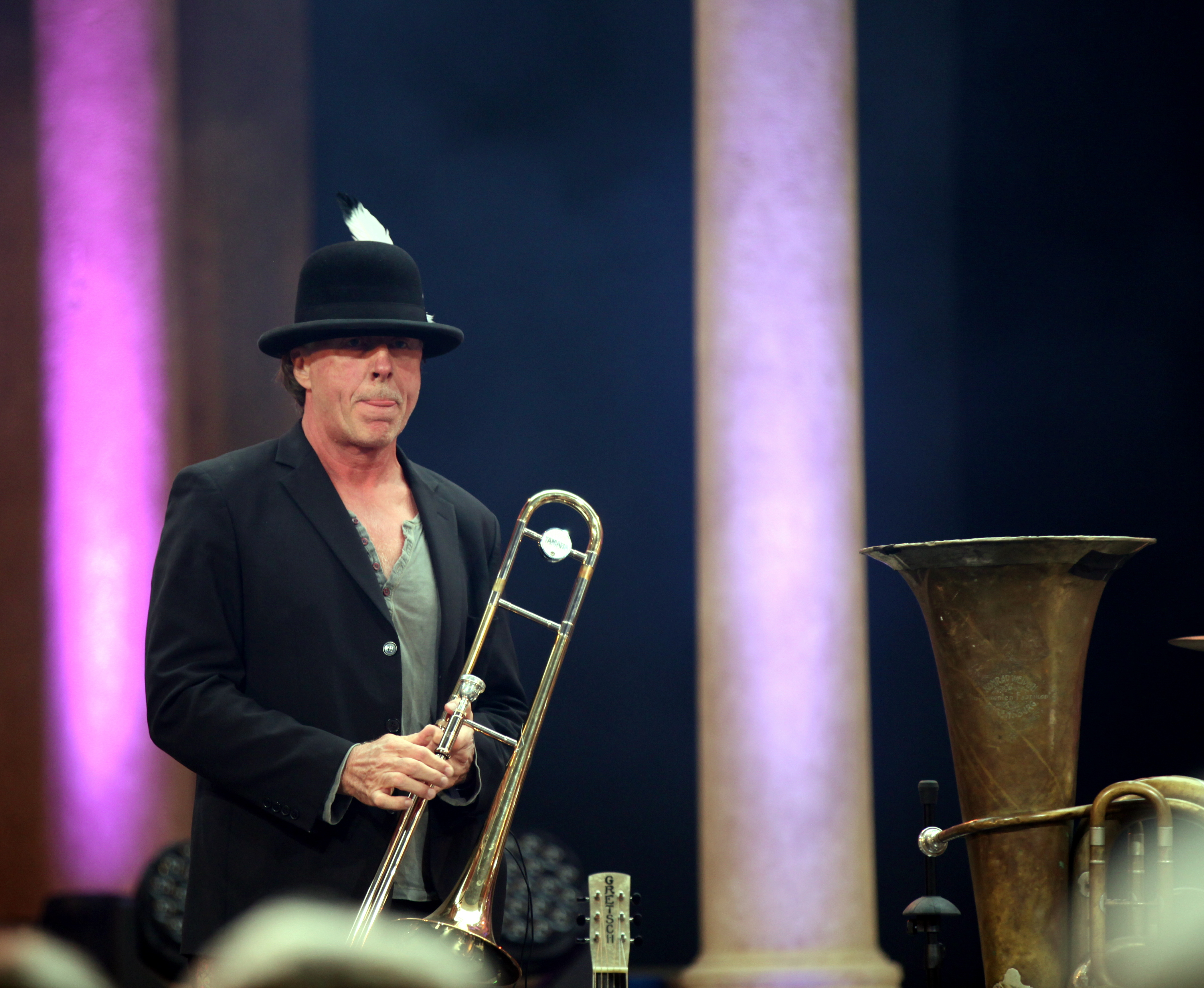 Hannes Ringlstetter mit Begleitmusikern auf dem Heimatsoundfestival 2015 Edgar Feichtner mt Posaune